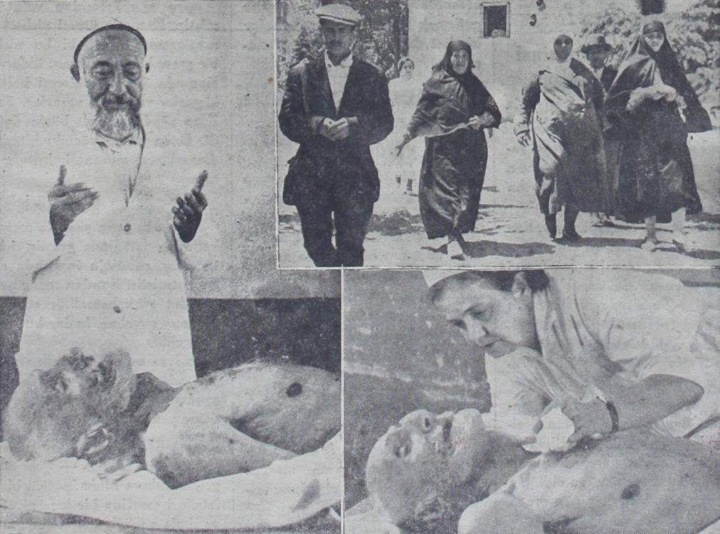 Solda, Zaro Ağa'nın cenazesi başında dua okuyan hoca; sağ üstte Zaro Ağa'nın cenazesine gelen kızı ve torunları; sağ altta ise çenesini bağlayan hemşire yer almaktadır.